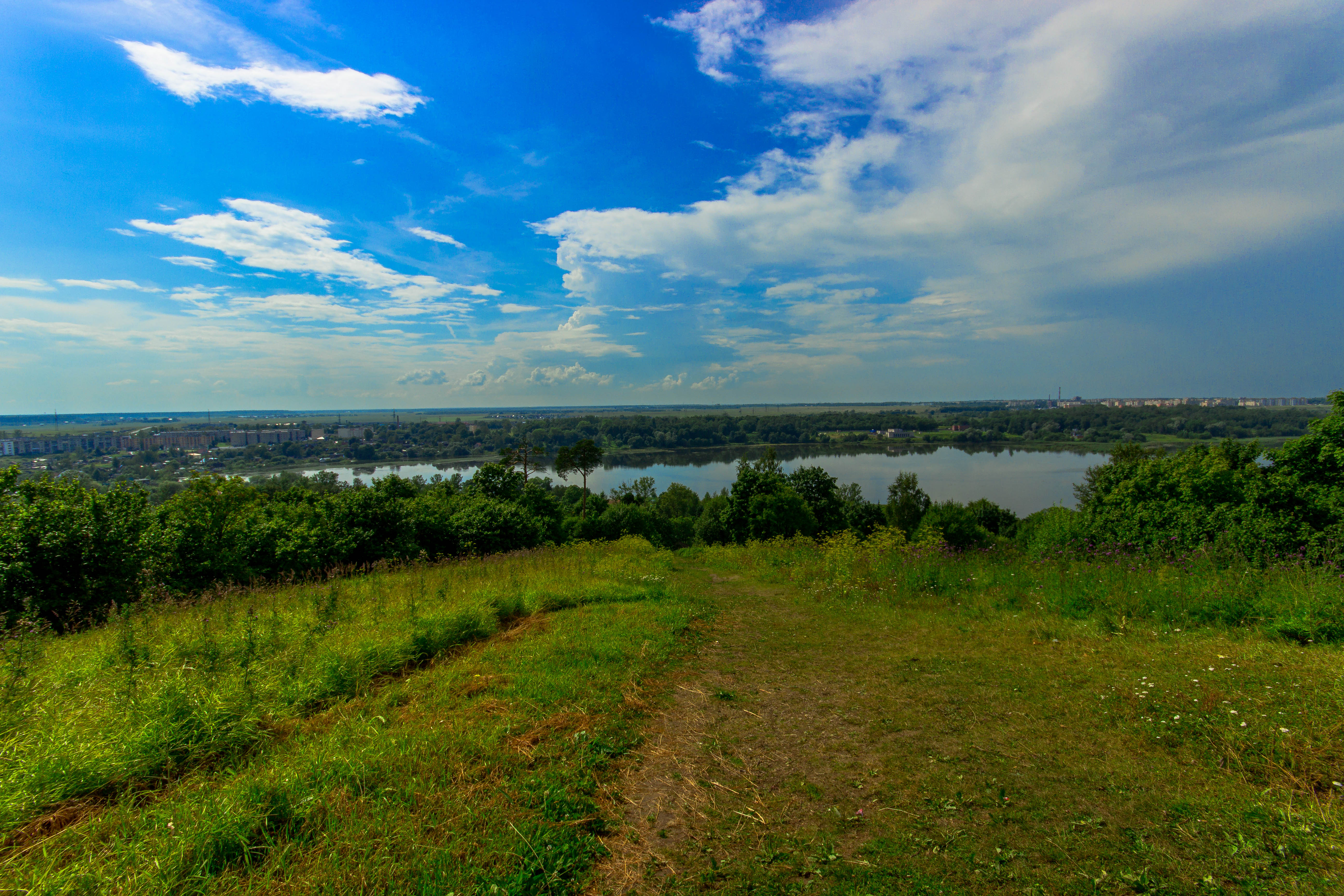 Дудергофские высоты, This image is related to the protected area of Russia number 7810010